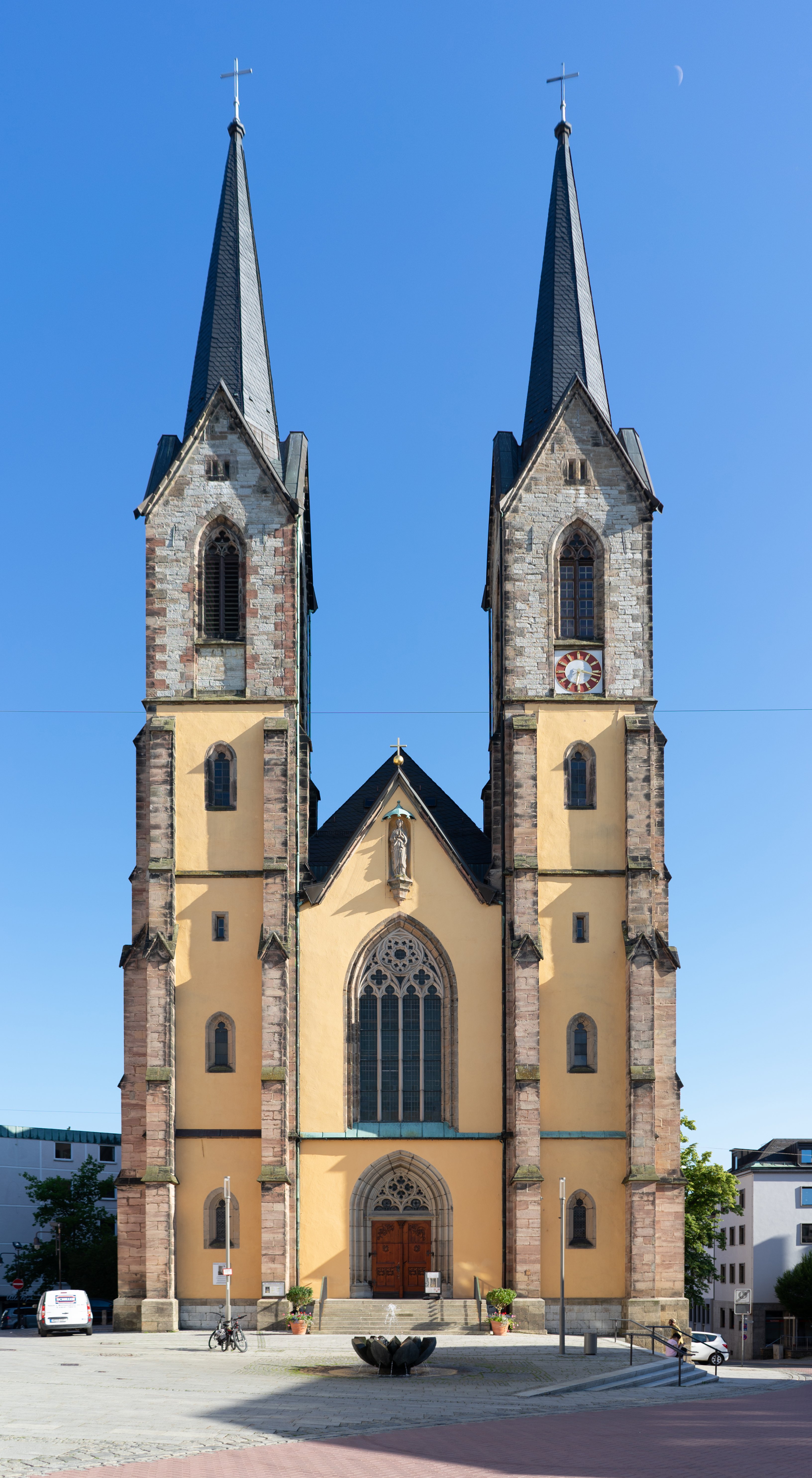 Marienkirche Hof/Kirche St. Marien in der Hofer Altstadt.